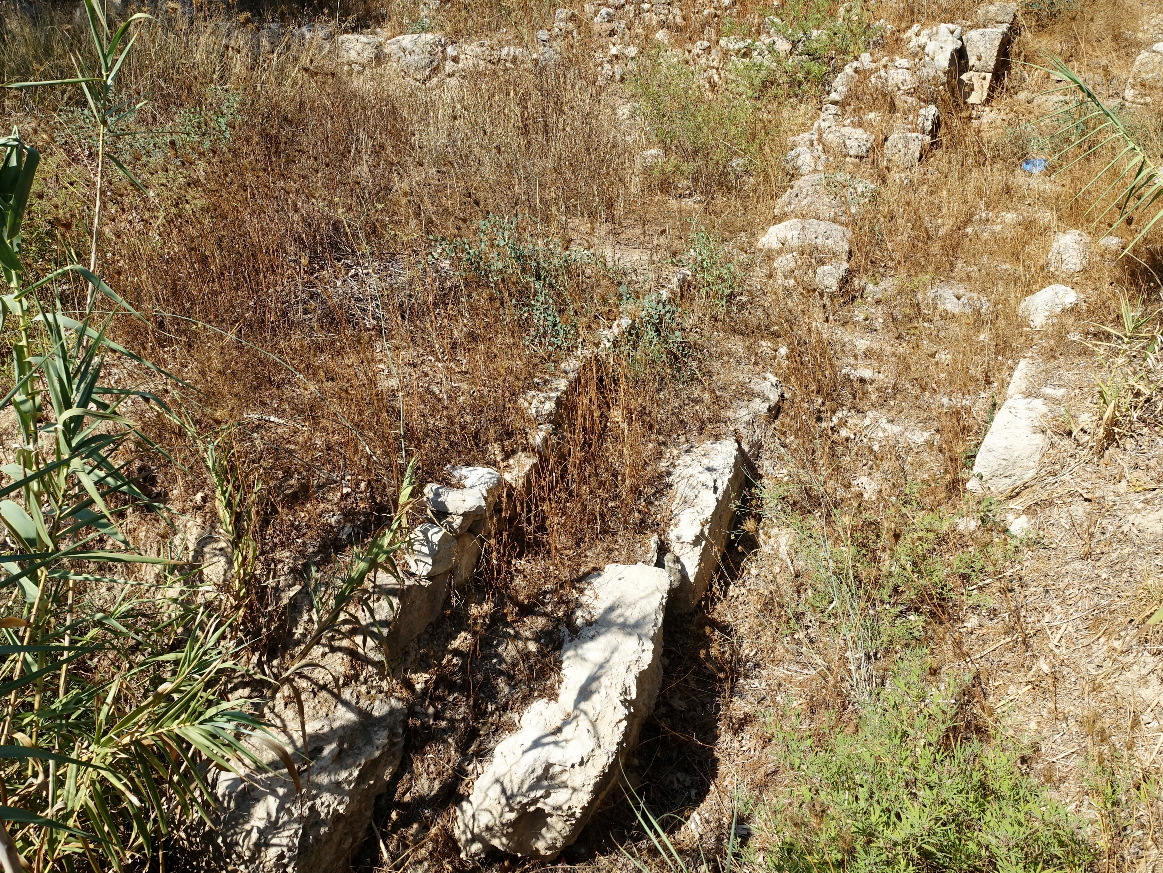 Minoische Villa von Klimataria, Gemeinde Sitia, Kreta, Griechenland